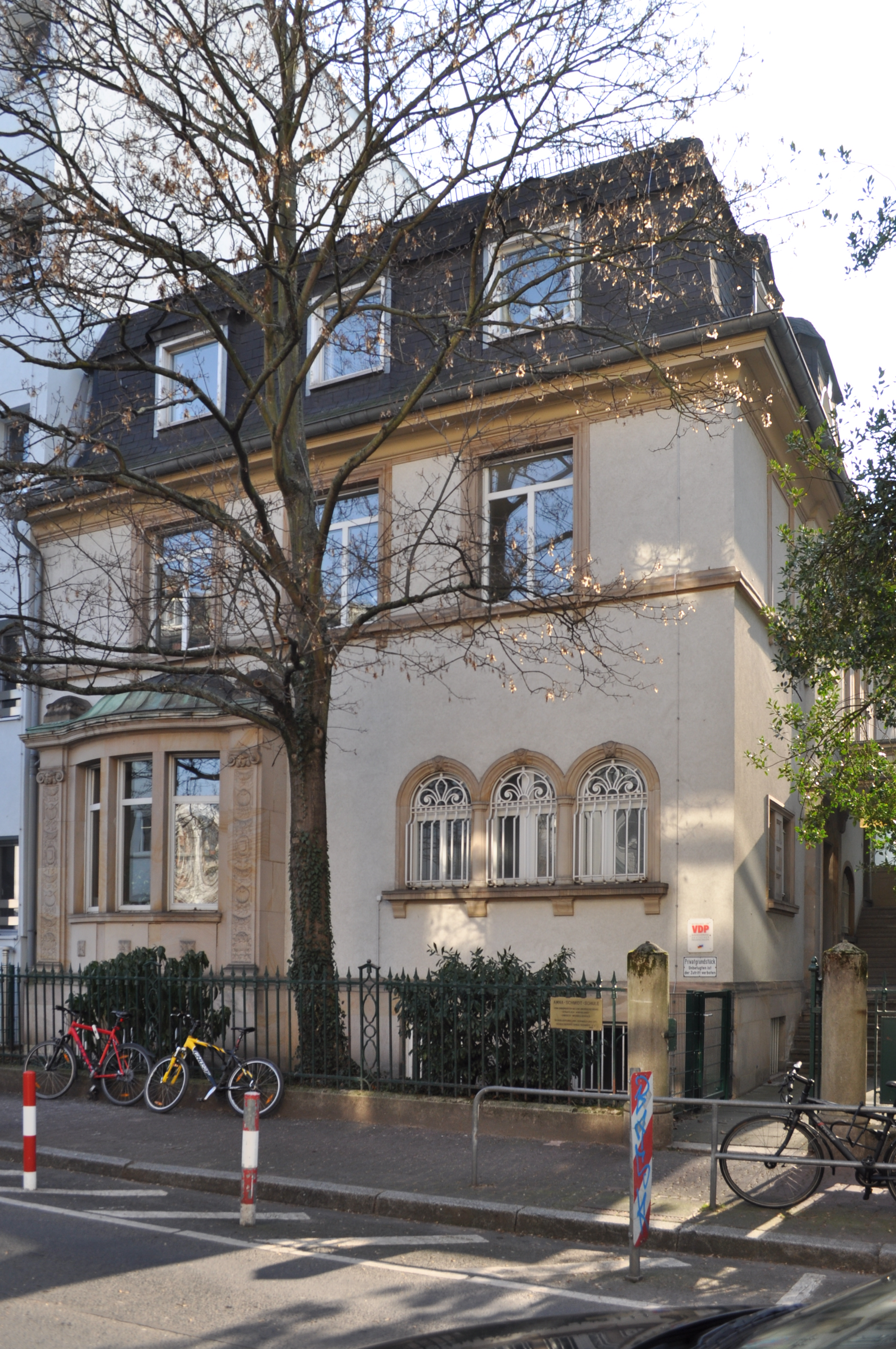 Denkmalgeschütztes Haus Gärtnerweg 29 in Frankfurt